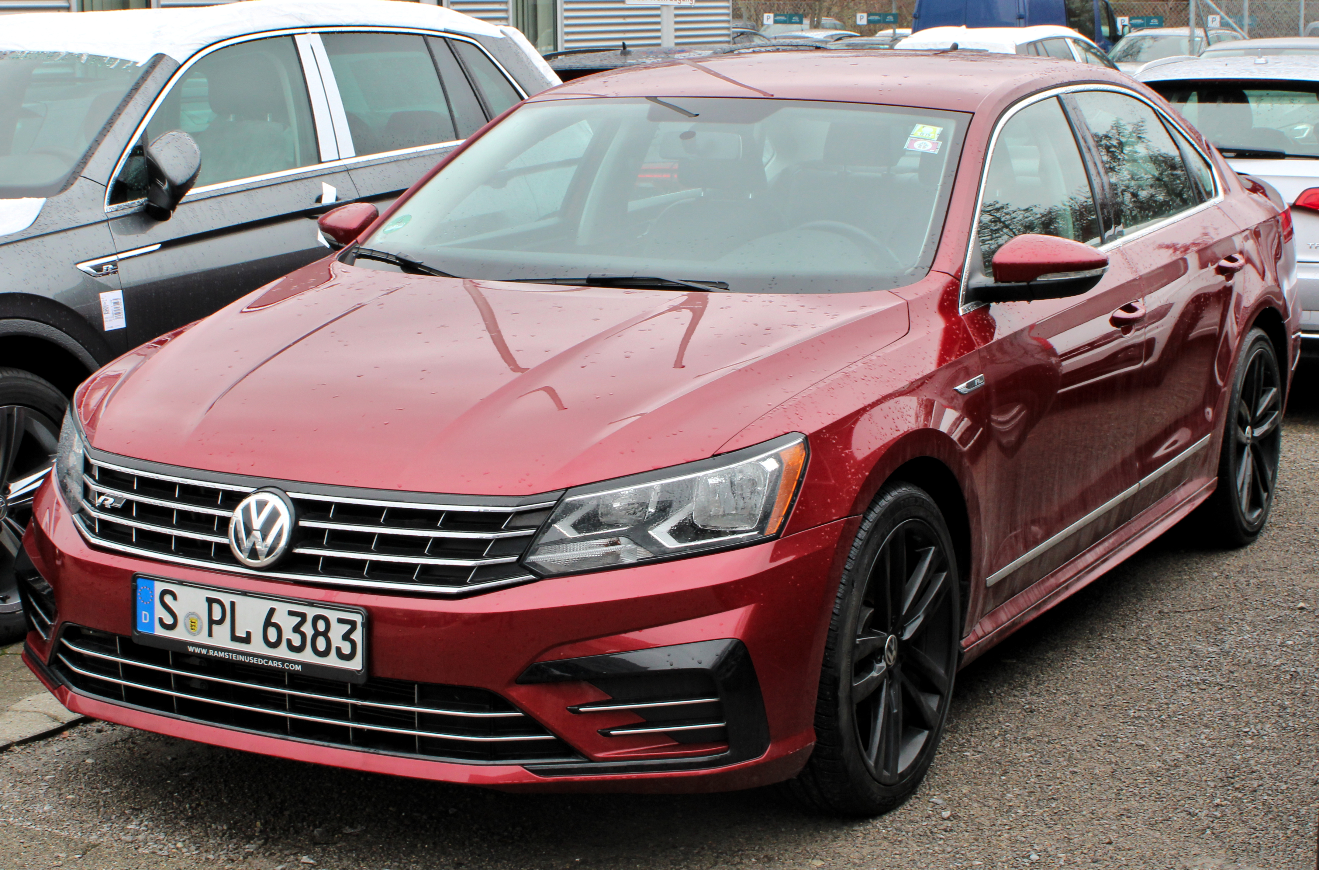 VW Passat NMS in Stuttgart-Vaihingen